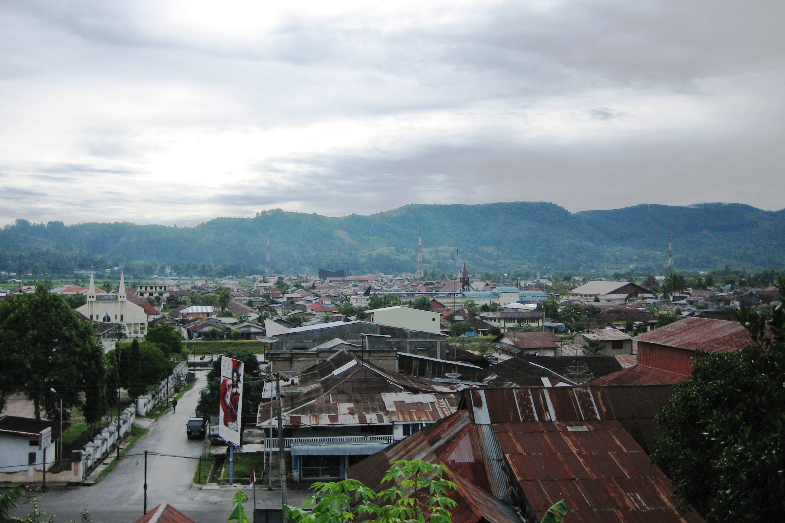 Tarutung